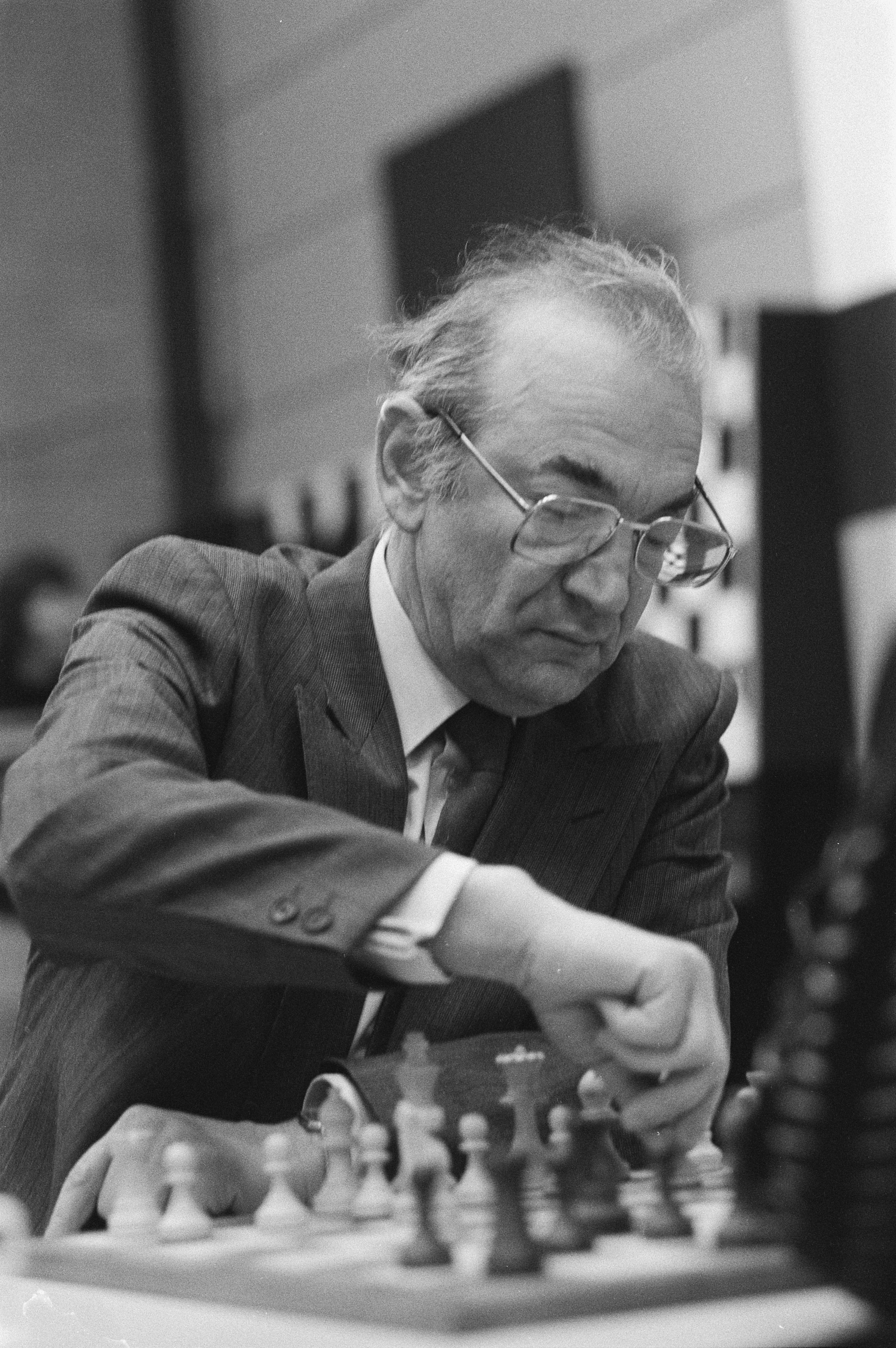 Collectie / Archief : Fotocollectie Anefo Reportage / Serie : [ onbekend ] Beschrijving : Hoogovenschaaktoernooi, 9e ronde; Kortsjnoj in zijn partij tegen Timman vandaag (close), 6, 7 Timman (close) Datum : 29 januari 1985 Trefwoorden : schaken Persoonsnaam : Kortsjnoi, Viktor Instellingsnaam : Hoogovenschaaktournooi Fotograaf : Croes, Rob C. / Anefo Auteursrechthebbende : Nationaal Archief Materiaalsoort : Negatief (zwart/wit) Nummer archiefinventaris : bekijk toegang 2.24.01.05 Bestanddeelnummer : 933-2186